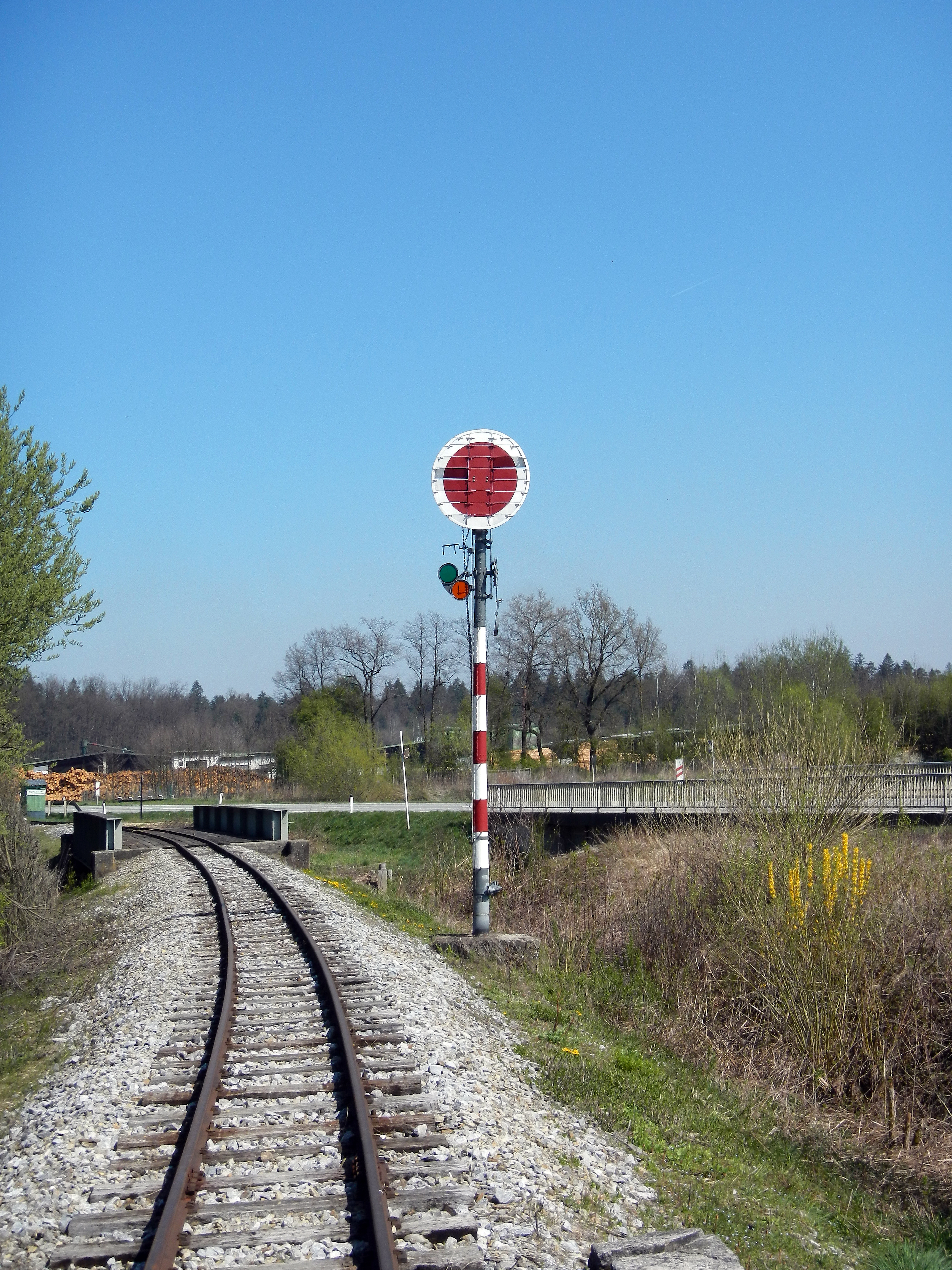 Distanzsignal an der schmalspurigen Bahnlinie Preding-Wieselsdorf - Stainz (Stainzerbahn) in Wohlsdorf, Steiermark, Österreich.